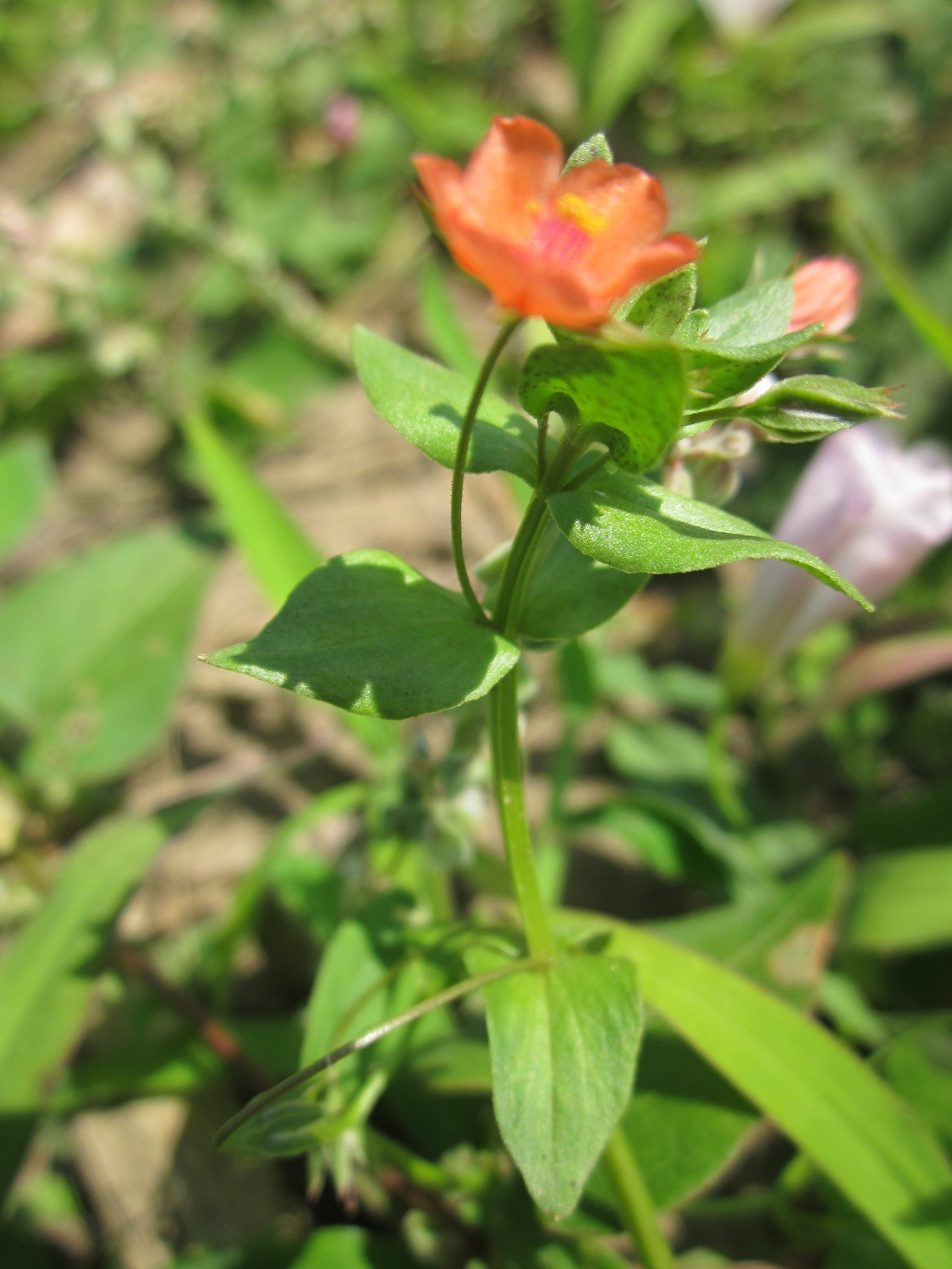 Acker-Gauchheil (Lysimachia arvensis) im Hockenheimer Rheinbogen